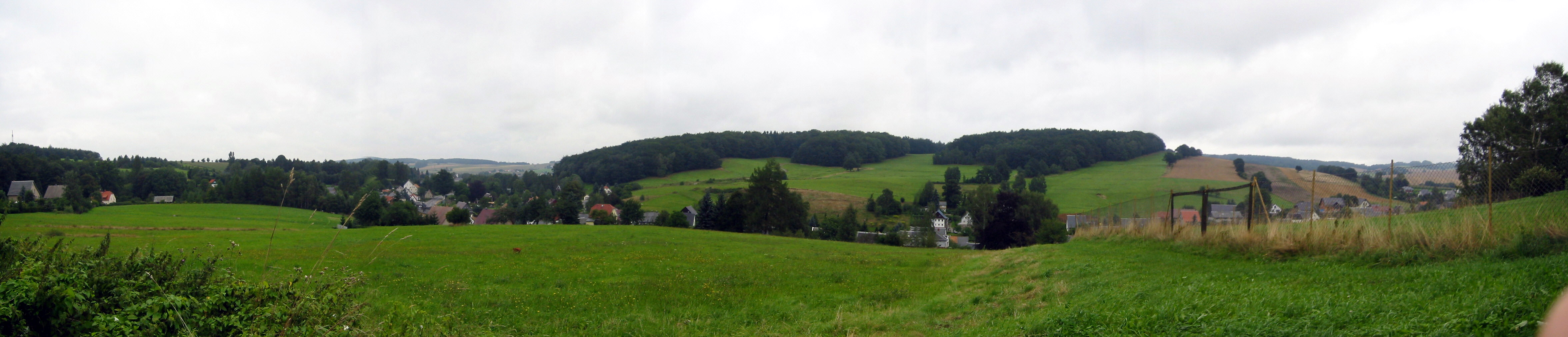 Panoramablick Ringenhain ins Tal der Wesenitz, Lausitz